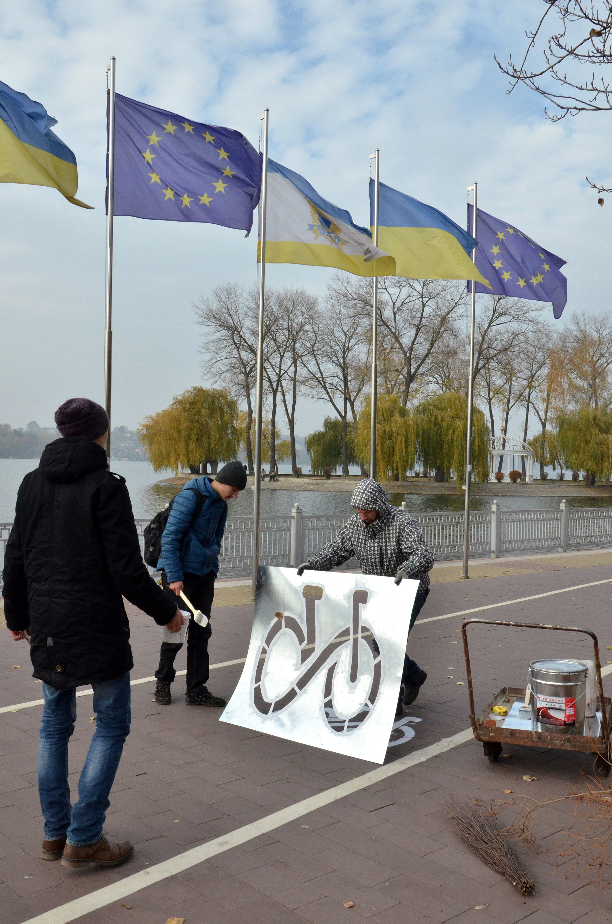 Велоактивісти наносять розмітку на велодоріжку в парку імені Тараса Шевченка в Тернополі. Справа — Юрій Суходоляк.